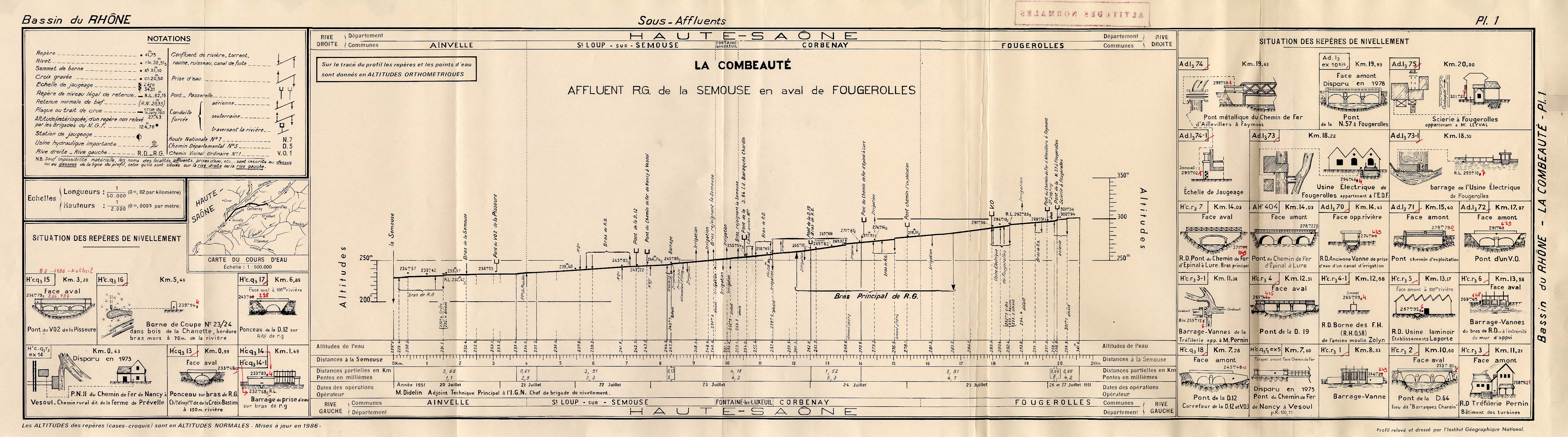 Profil altimètrique de la Combeauté entre la commune de Fougerolles (70) et sa confluence avec la Semouse. Levé par M. Didelin, chef de Brigade nivellement à l'IGN.